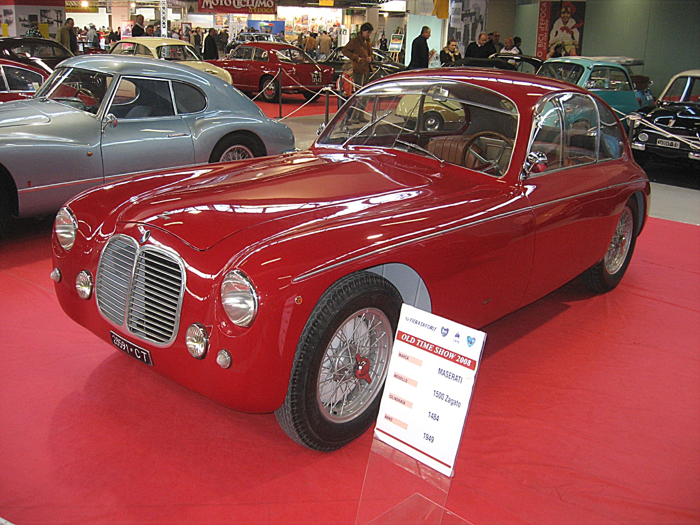 Subject